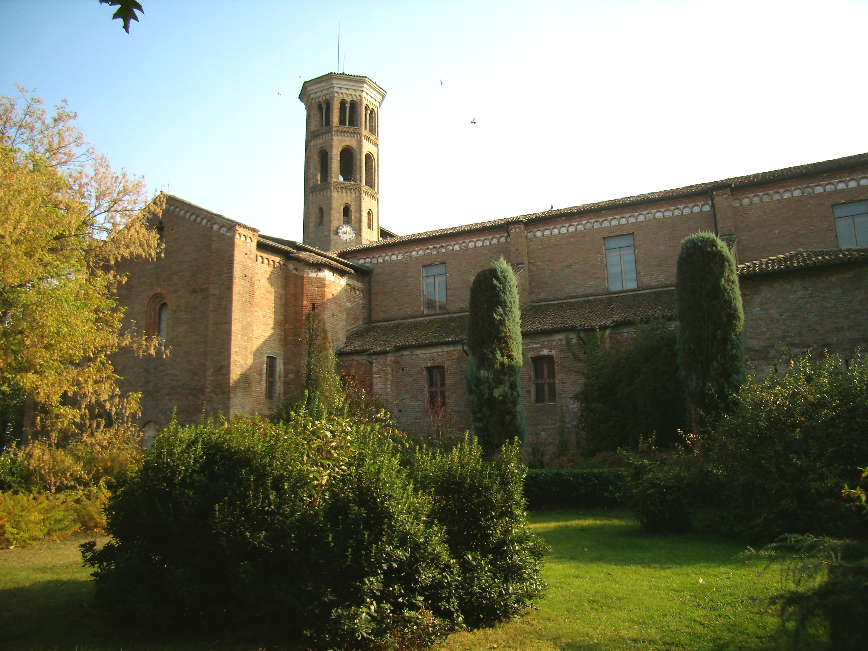 Abbadia Cerreto, il fianco settentrionale della chiesa parrocchiale dell'Assunzione della Beata Vergine Maria.